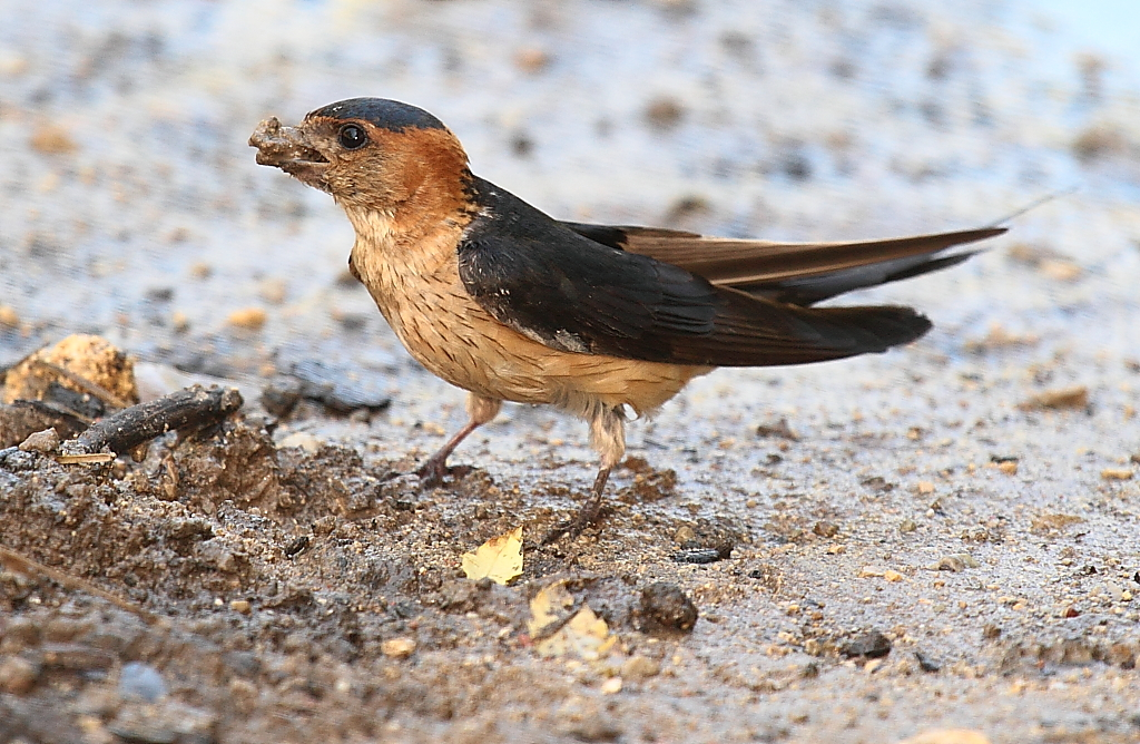 Golondrina dáurica Cecropis daurica, Spain.